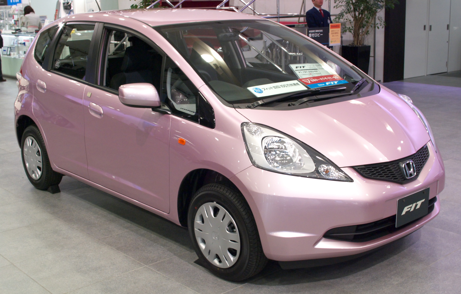 2007 Honda Fit in Honda Welcome Plaza